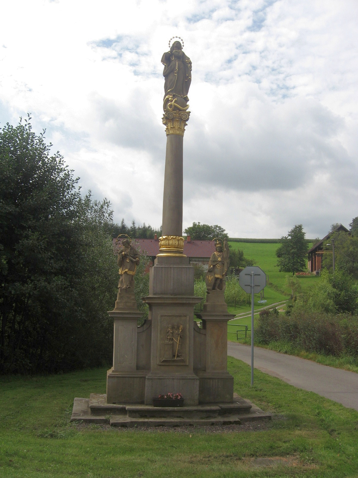 Sloup se sousoším P. Marie (Slatina nad Úpou), proti odbočce k Boušínu, Slatina nad Úpou